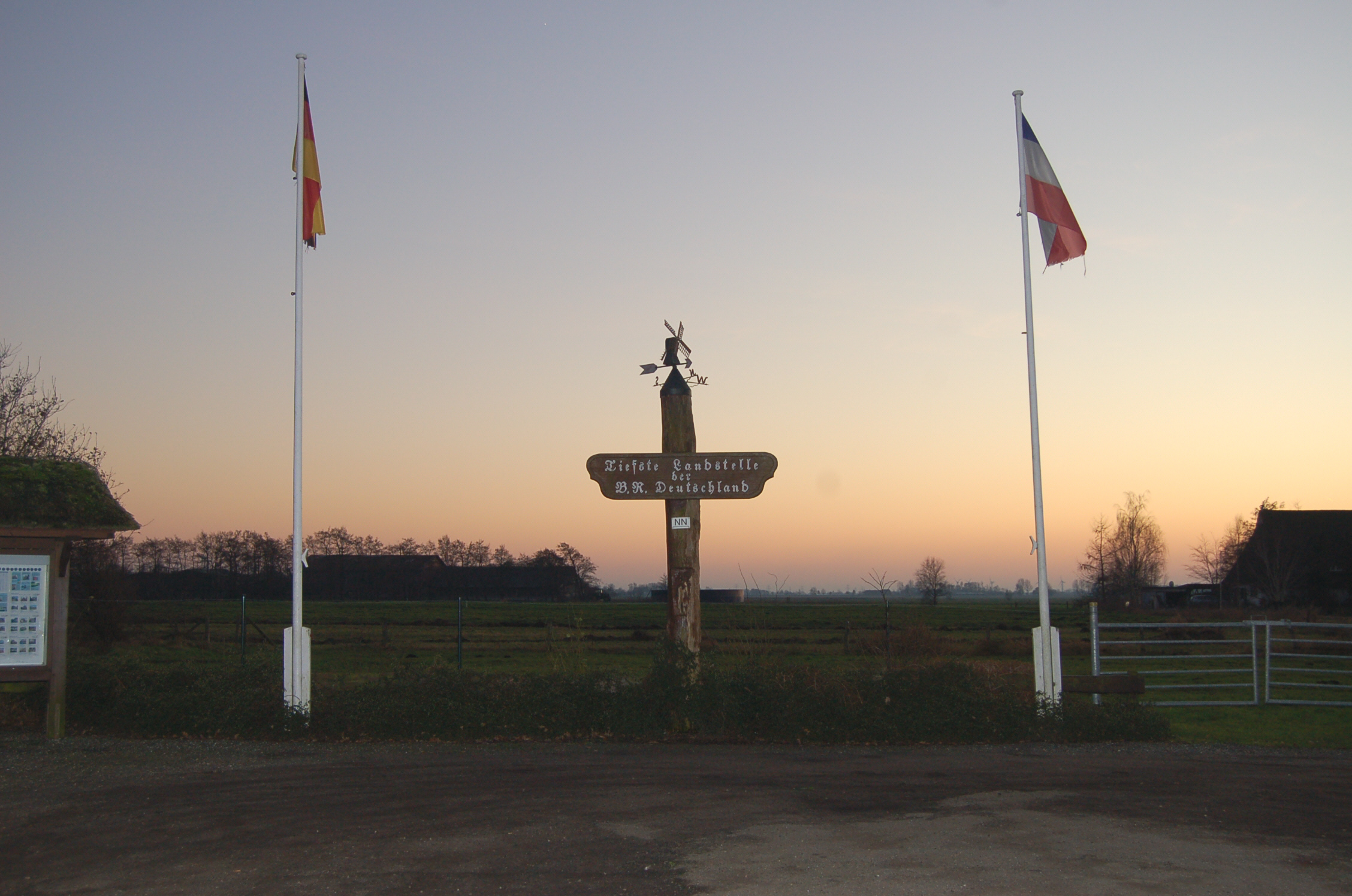 Markierung der tiefsten Landstelle Deutschlands in Neuendorf-Sachsenbande in der Abenddämmerung